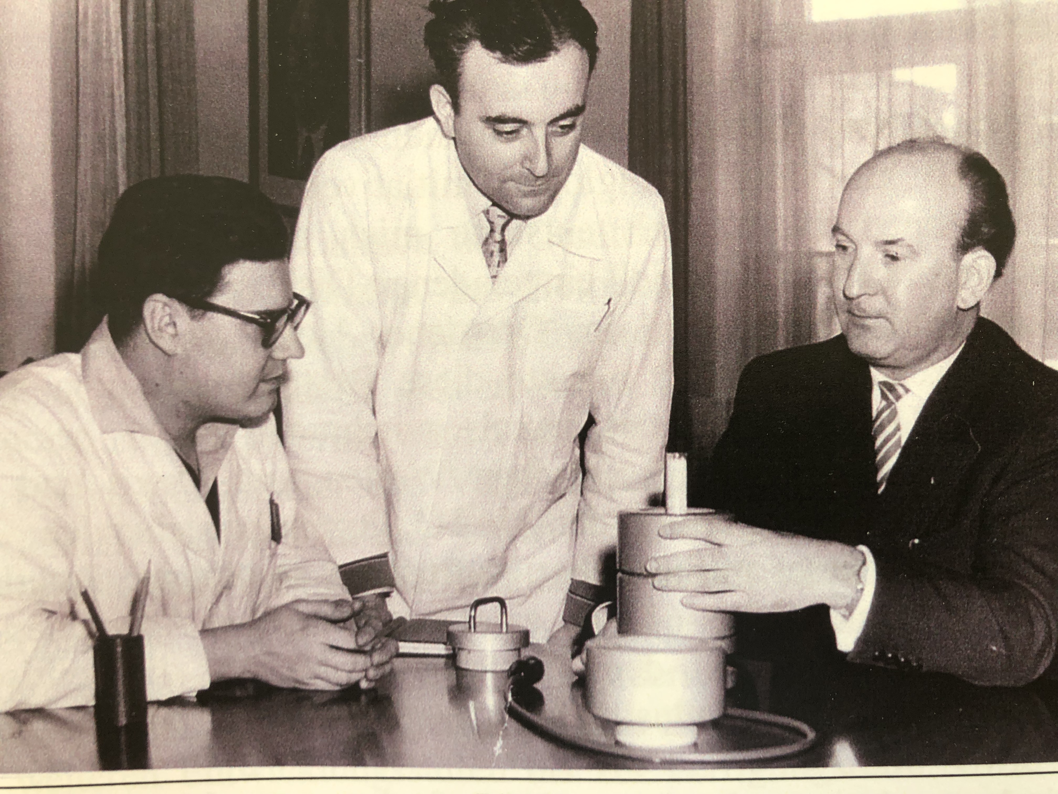 Technische Besprechung einer Geräteentwicklung im VEB Vakutronik Dresden, Hans Lippmann mit Werner Hartmann und Herrn Wisch